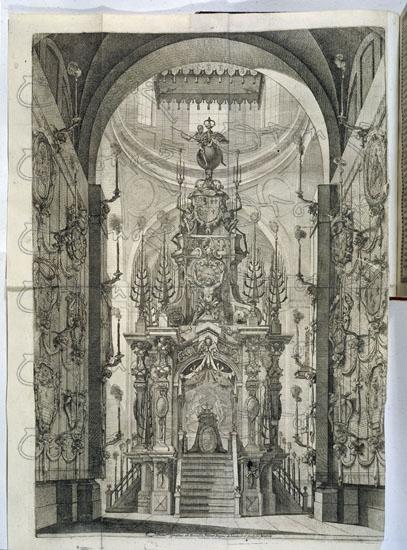 Catafalco para las exequias de la reina María Luisa de Orléans (1662-1689), que fue la primera esposa del rey Carlos II de España, en la iglesia del Real Monasterio de la Encarnación de Madrid (1689), obra de José Benito de Churriguera.